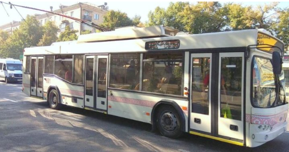 Запоріжжя, проспект Соборний